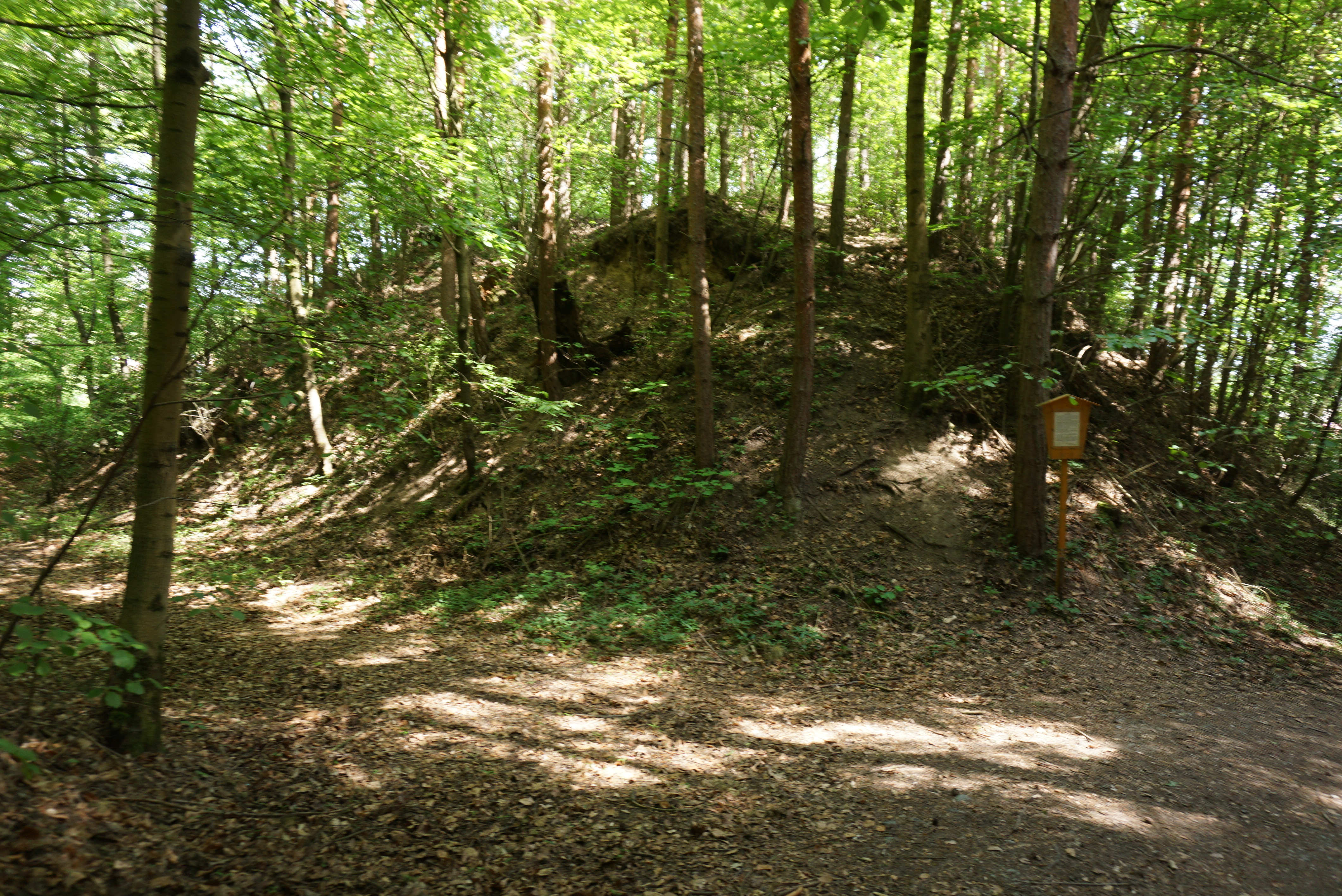 Tvrz Starý zámek, jih obce na ostrohu, Hradečno.